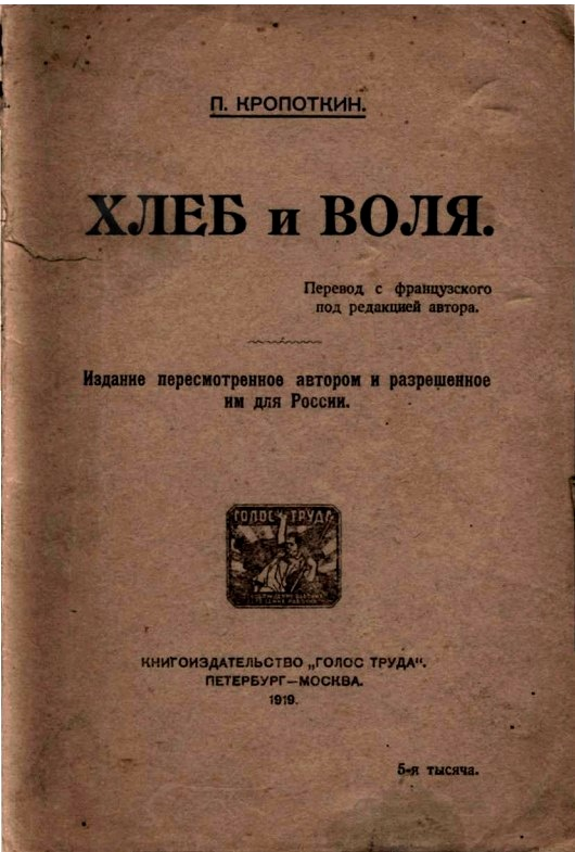 Хлеб и воля, Книгоиздательство «ГОЛОС ТРУДА» 1919 г. Обложка.